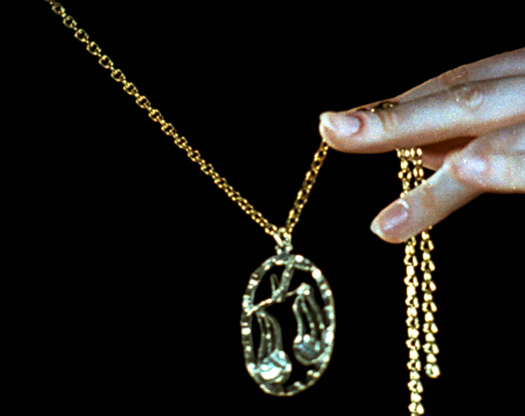 Фото реквизиты рекламного фильма "Знаки зодиака" (1975)